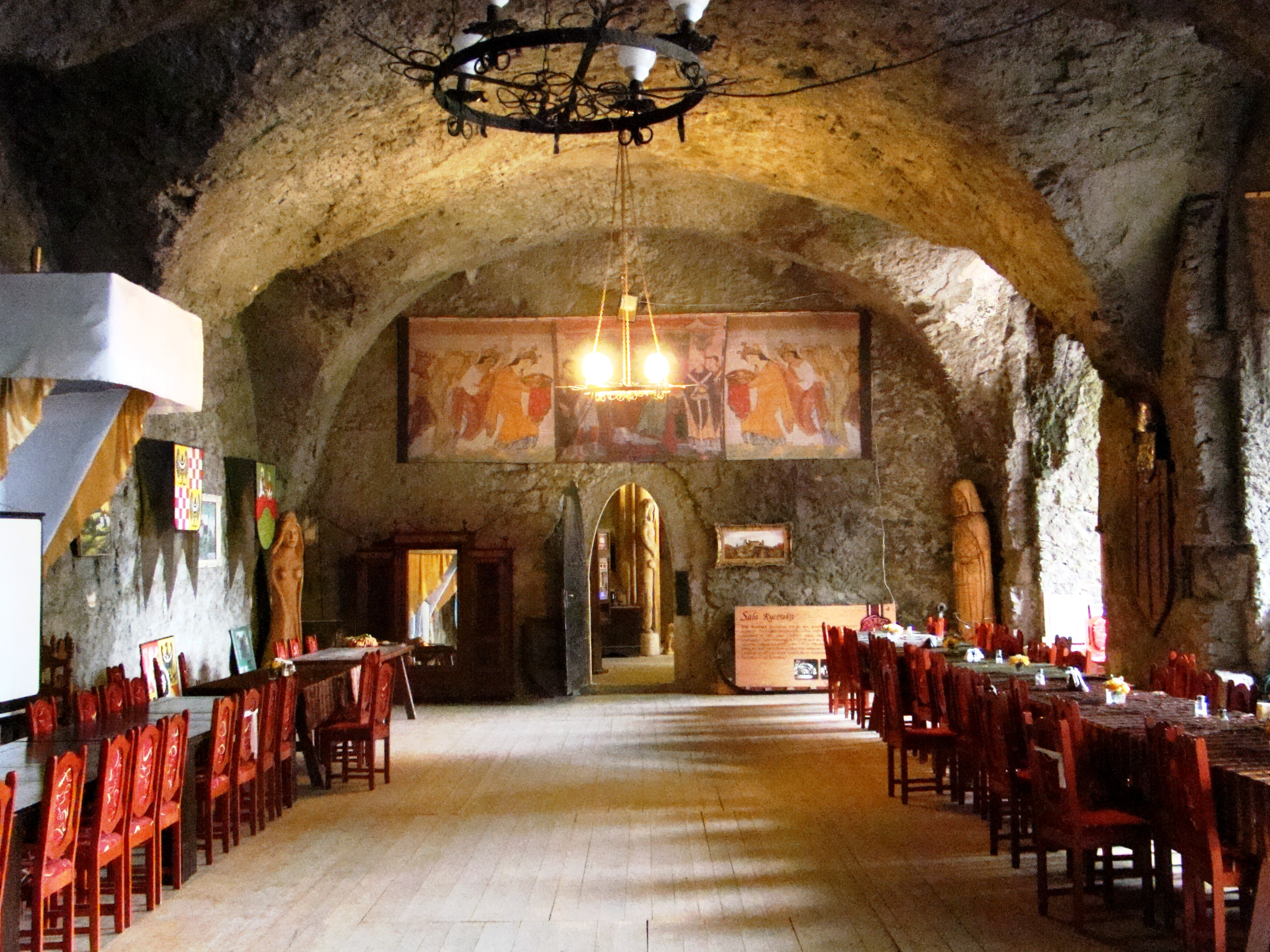 zespół zamkowy, XV-XX: - zamek Grodziec, Zagrodno